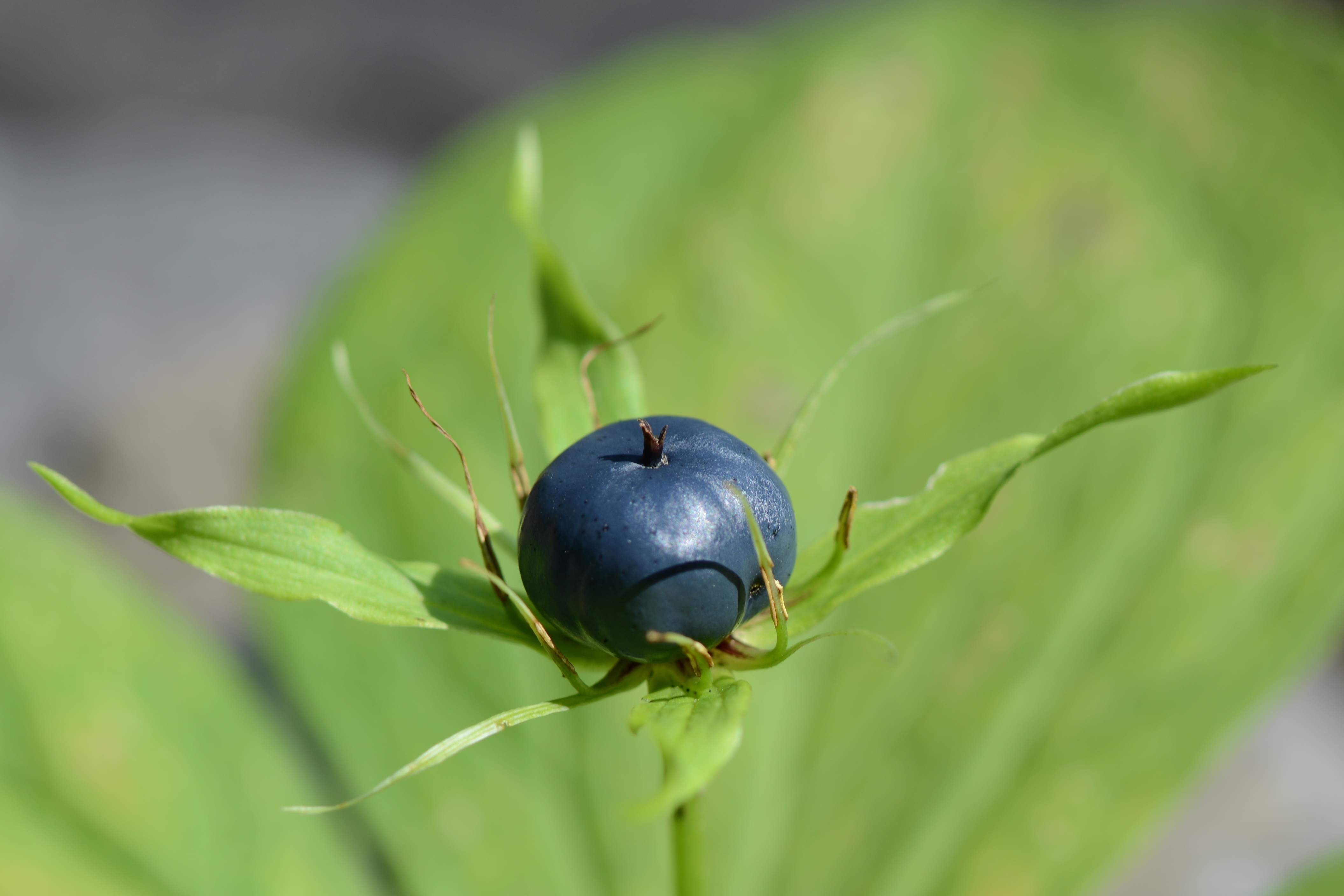 Paris quadrifolia